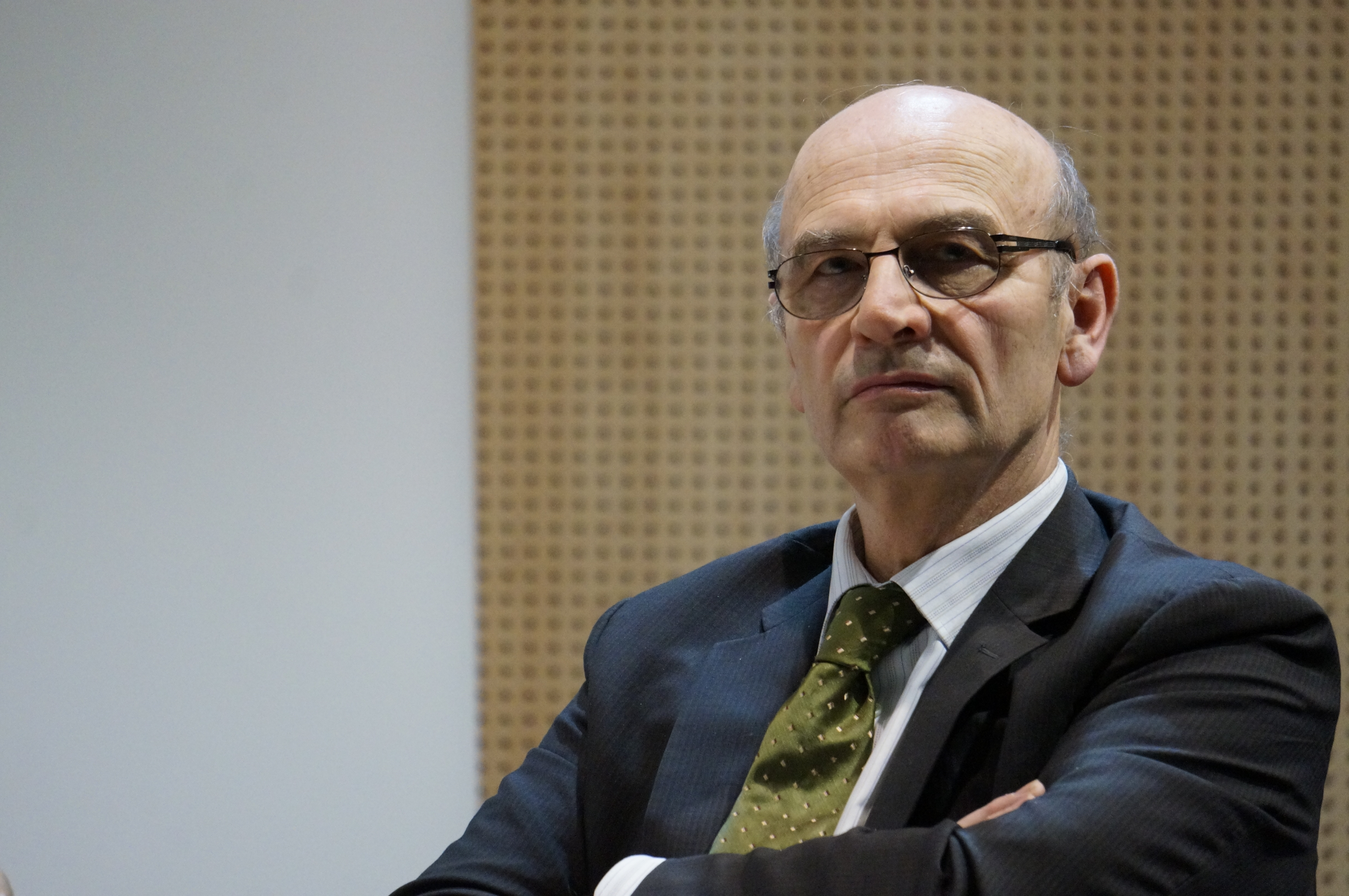 lors du colloque "imaginez la Paix en Europe" en 2015.